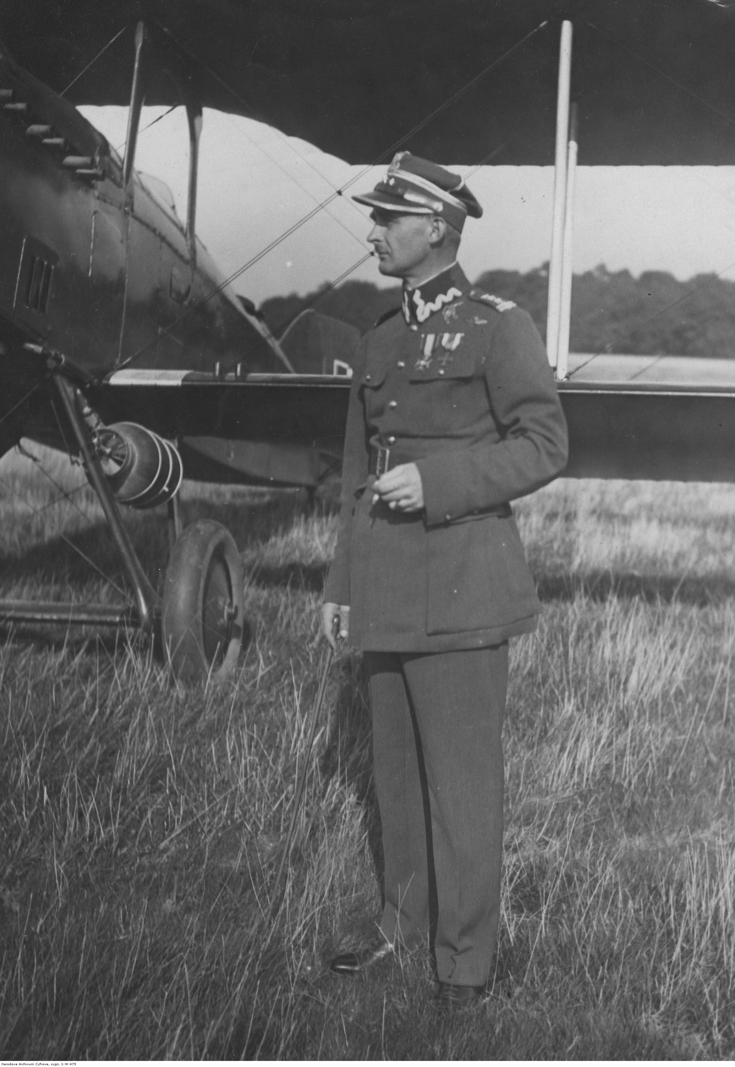 Pułkownik pilot Aleksander Serednicki przy samolocie. Koncern Ilustrowany Kurier Codzienny - Archiwum Ilustracji. Sygnatura: 1-W-479